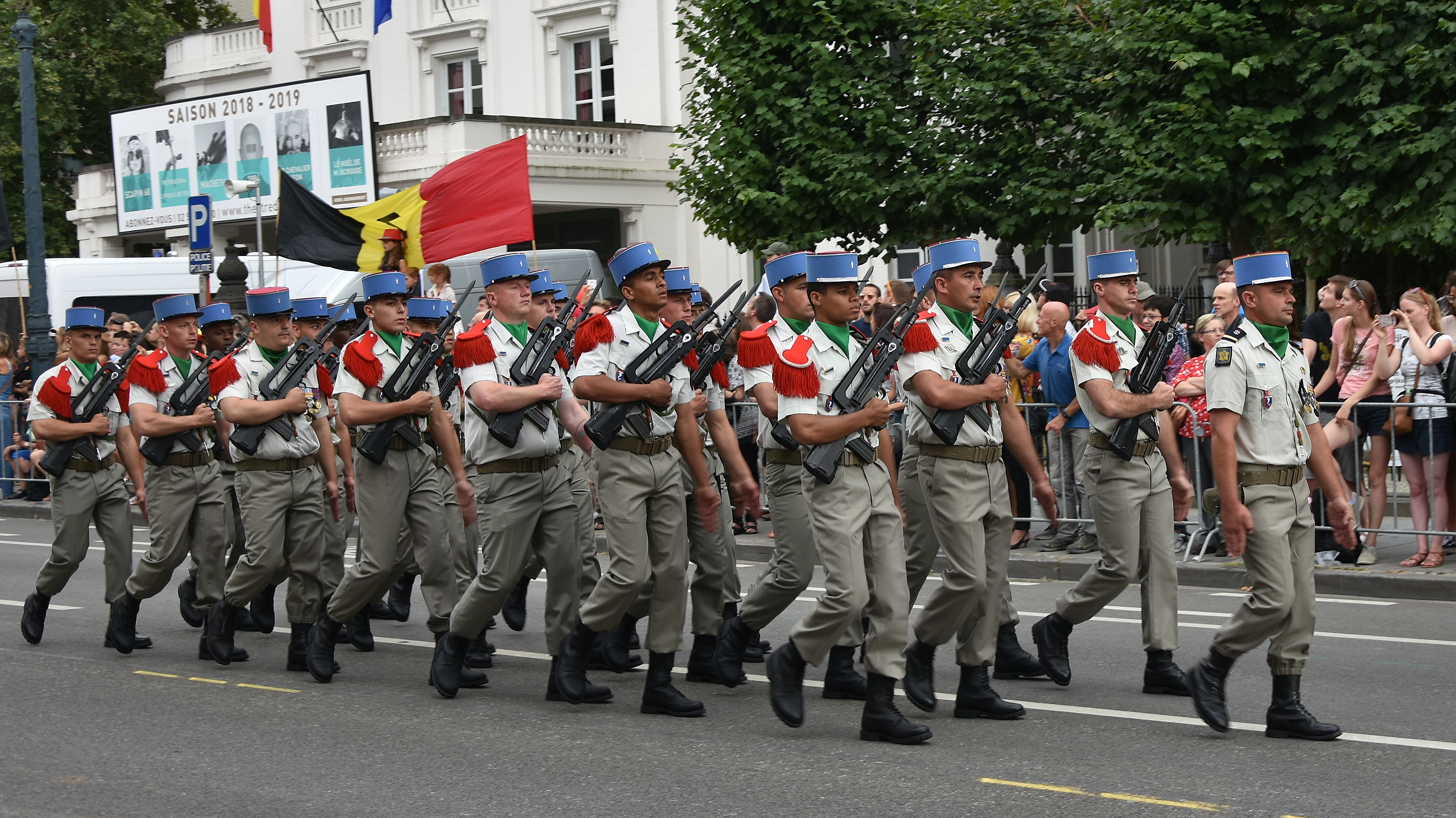 Nationaal defilé 2018 21-07-2018 16-31-18 This photo of immaterial heritage has been taken in the Brussels Capital Region